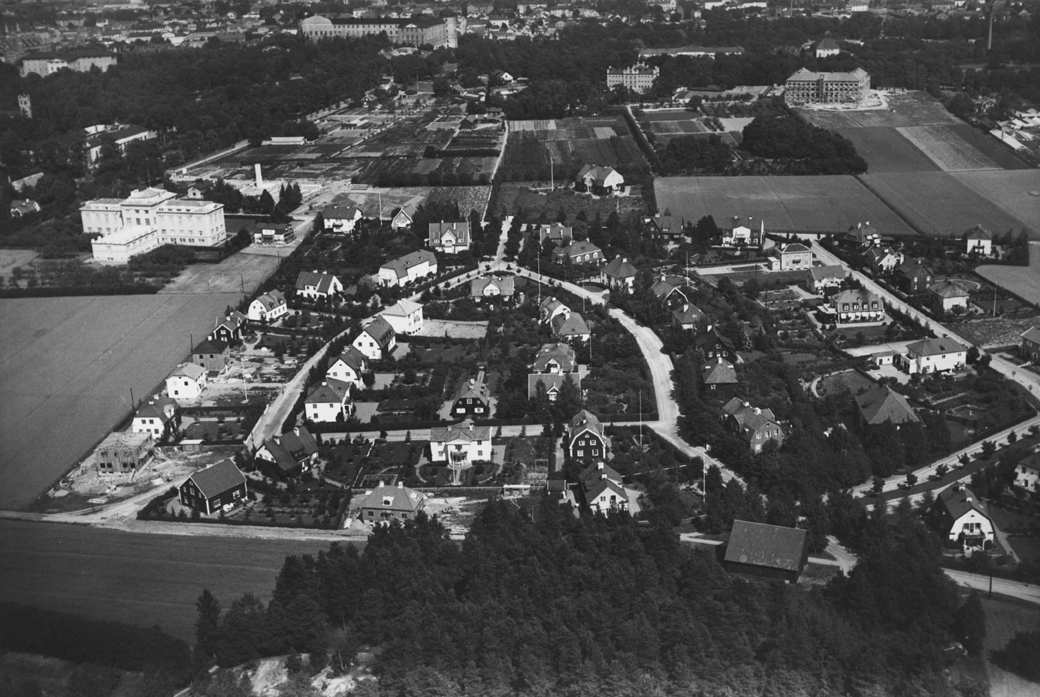 photos, uppsala, sweden